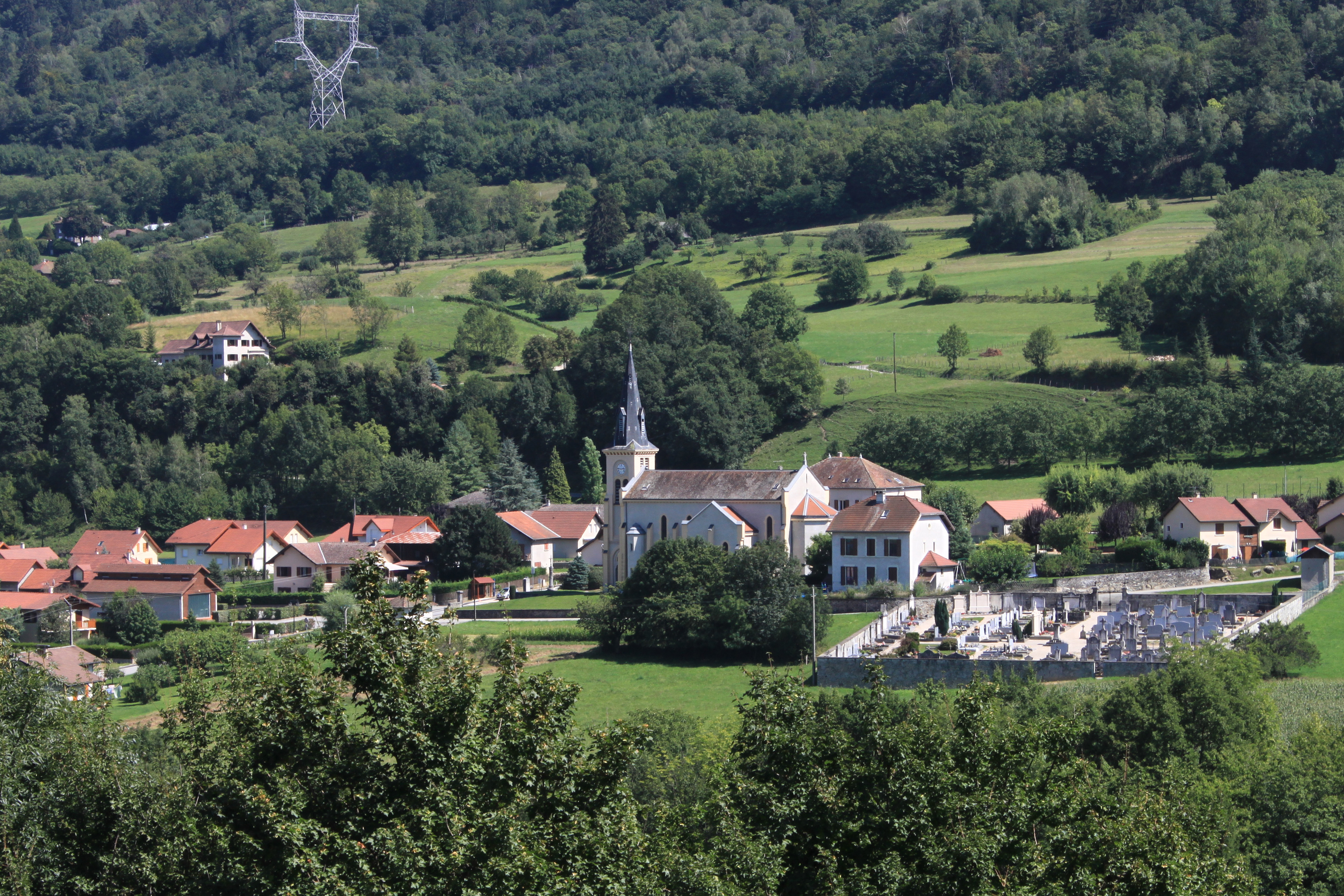 Saint-Maximin (Isère) vu depuis la Tour d'Avalon